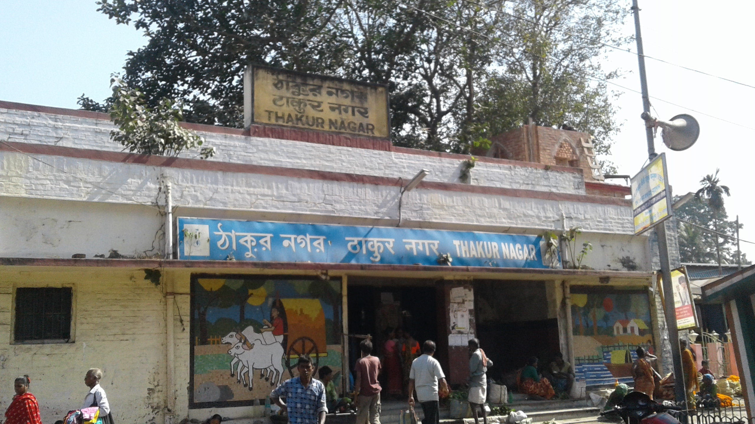 ঠাকুরনগর রেল স্টেশনের প্রবেশ পথ।